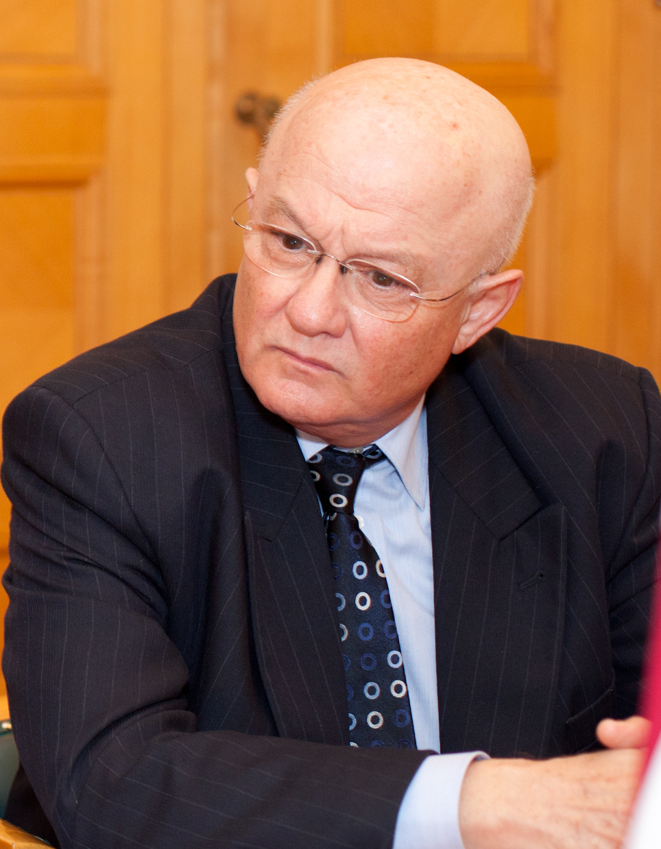 Ministru prezidents Valdis Dombrovskis tiekas ar Izraēlas rūpniecības, tirdzniecības un nodarbinātības ministru Šalomu Simhonu 21.09.11.